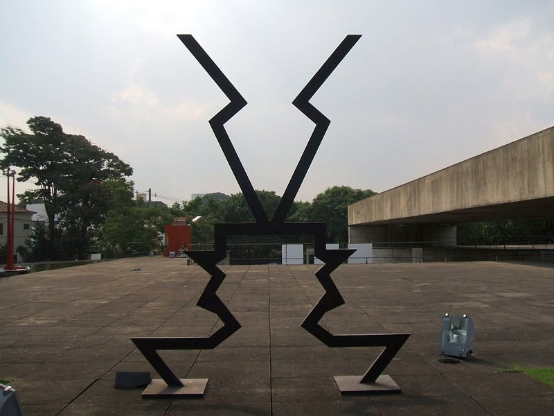 Cabeças, de Ivald Granato, no Museu Brasileiro da Escultura, São Paulo.